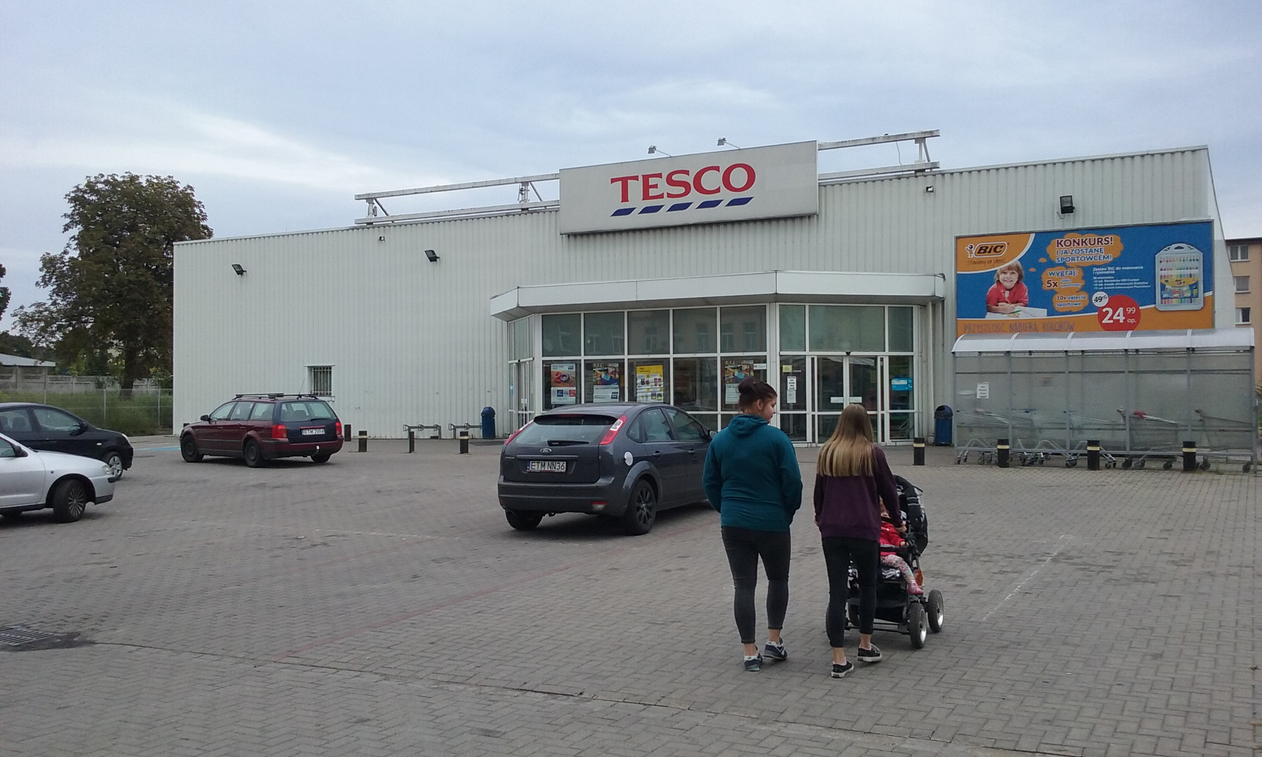 Tesco w Tomaszowie Mazowieckim, przy ulicy Warszawskiej